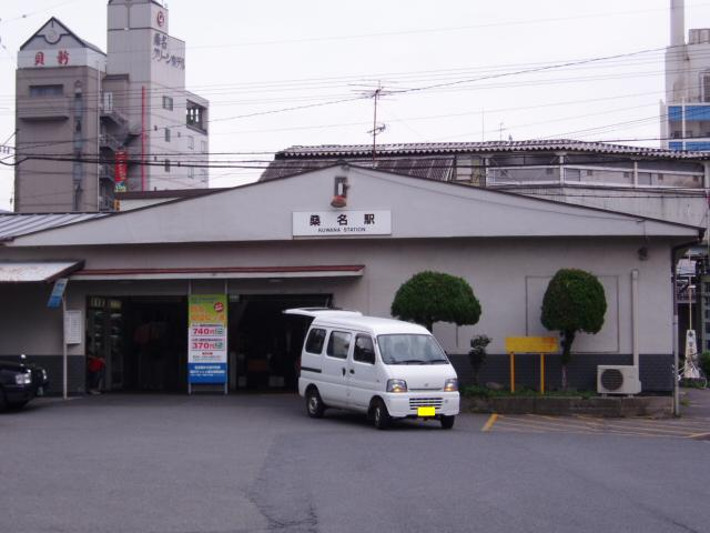 Kuwana Station West Gate 桑名駅西出口